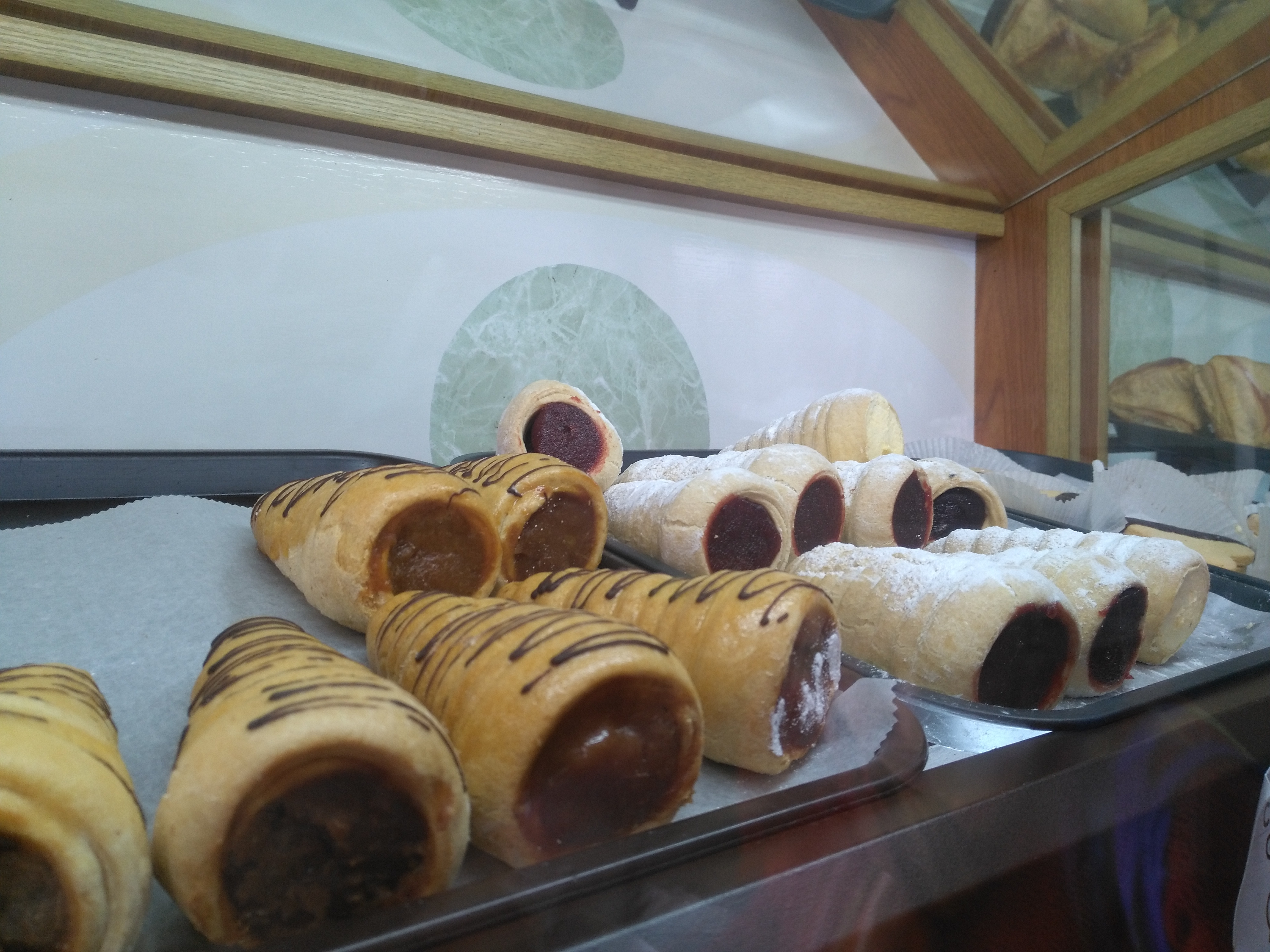 Tosteles de cacho de dulce de leche, mermelada de mora, mermelada de guayaba y crema pastelera en una panadería de San José